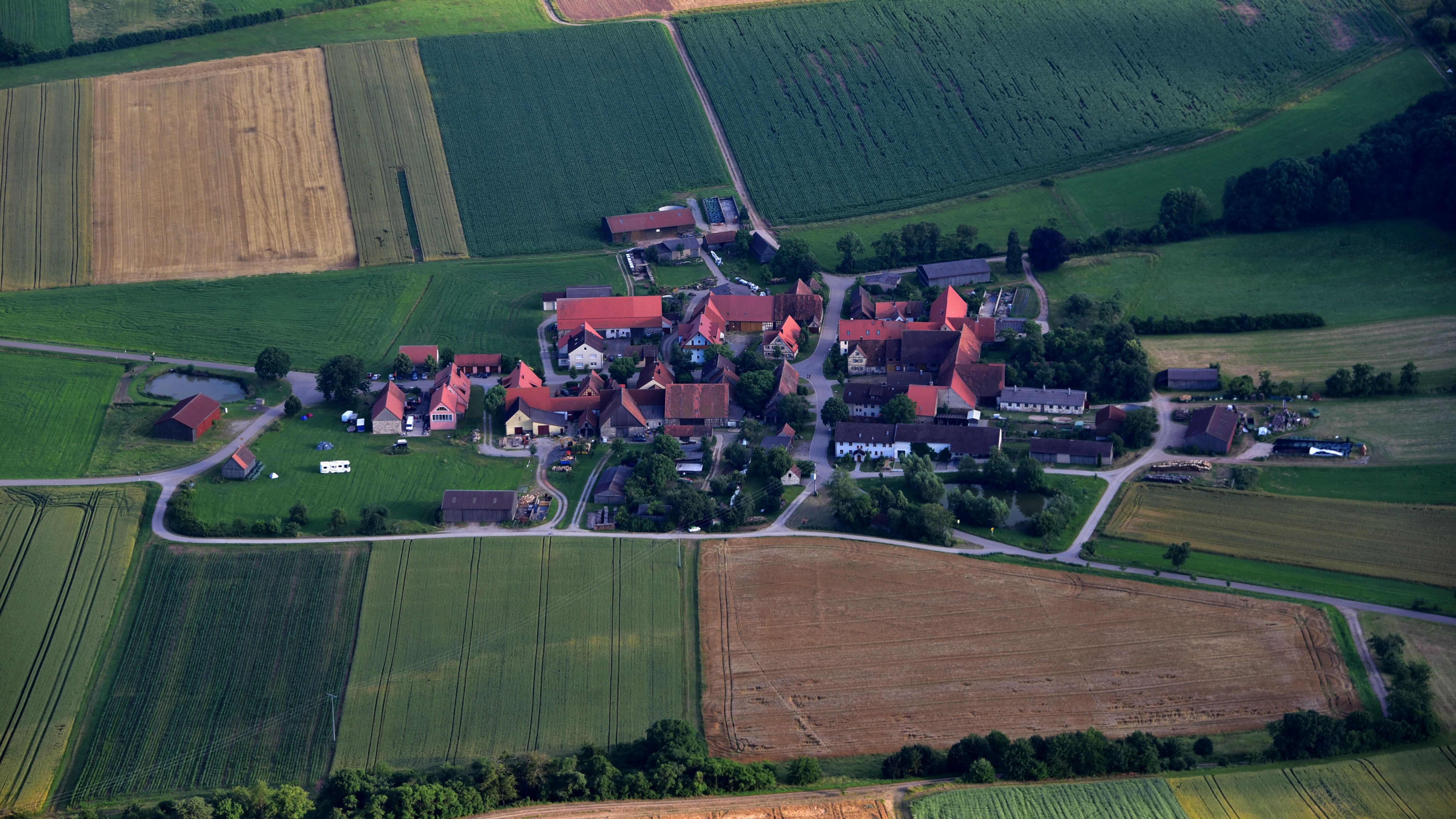 Aidenau, Luftaufnahme (2016)